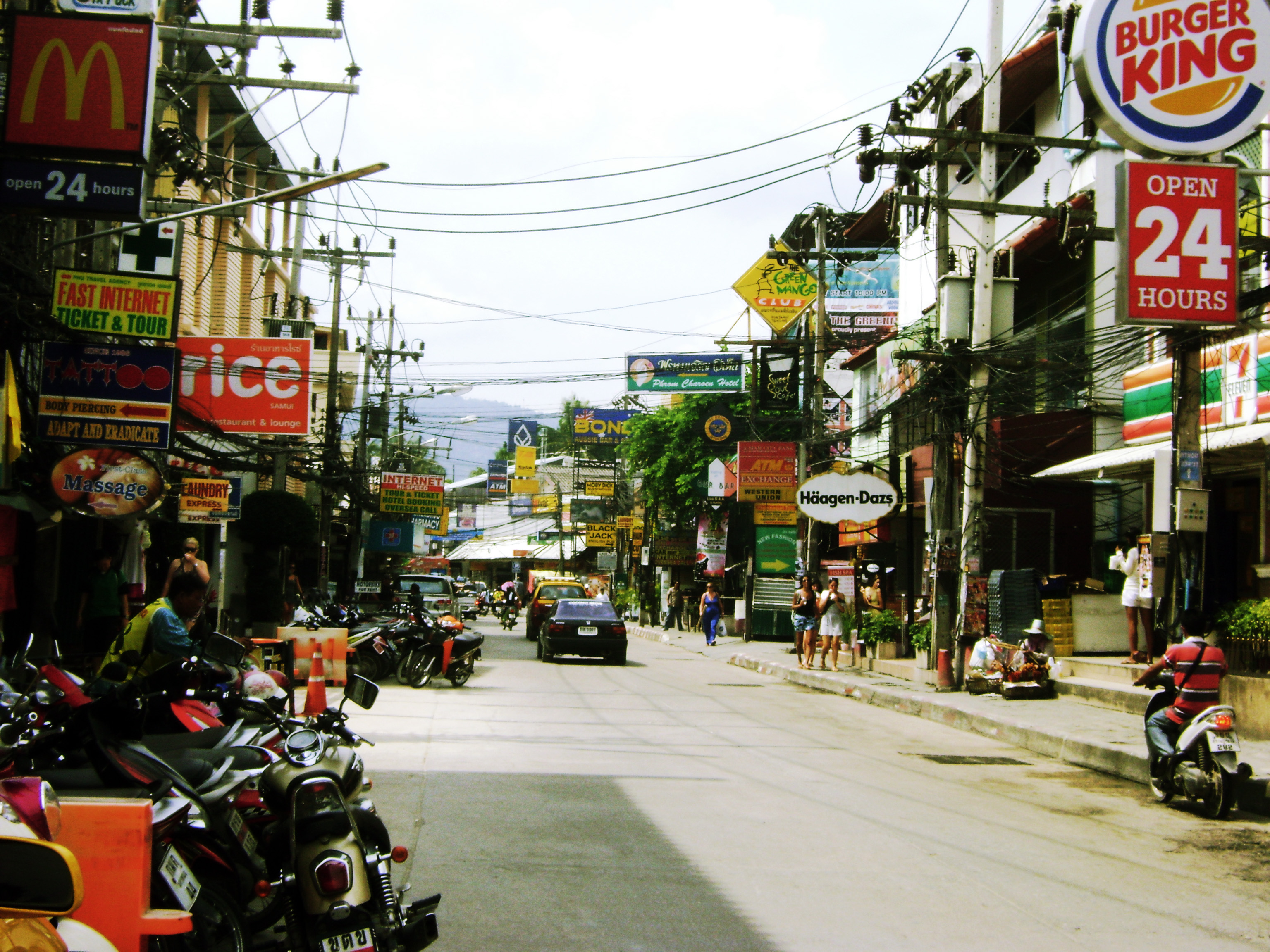 City of Chaweng Ko Samui, Thailand, typical Thailand city